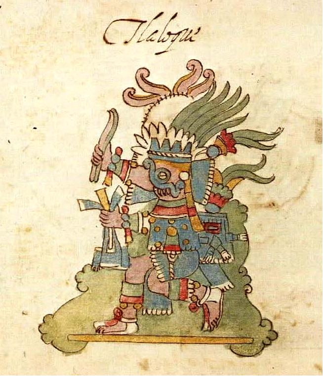 Tlaloc, from Codex Rios p. 20R